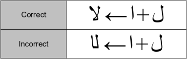 Copie d'écran d'un travail personnel représentant la ligature arabe لا. Vincent Ramos